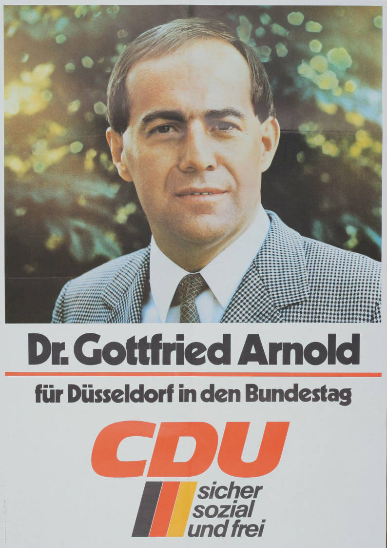 Dr. Gottfried Arnold für Düsseldorf in den Bundestag CDU sicher sozial und frei Abbildung: Porträtfoto Plakatart: Kandidaten-/Personenplakat mit Porträt Auftraggeber: CDU-Bundesgeschäftsstelle, Abt. Öffentlichkeitsarbeit, Bonn Objekt-Signatur: 10-001: 2461 Bestand: Plakate zu Bundestagswahlen (10-001) GliederungBestand10-18: Plakate zu Bundestagswahlen (10-001) » Die 9. Bundestagswahl am 5. Oktober 1980 » CDU » Mit Porträtfoto Lizenz: KAS/ACDP 10-001: 2461 CC-BY-SA 3.0 DE